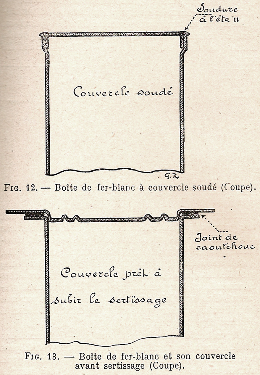 Schémas différenciant la soudure et le sertissage des boites de conserve. D'après l'exemplaire du livre à la Bibliothèque de la Gourmandise, Hermalle-sous-Huy, Belgique.